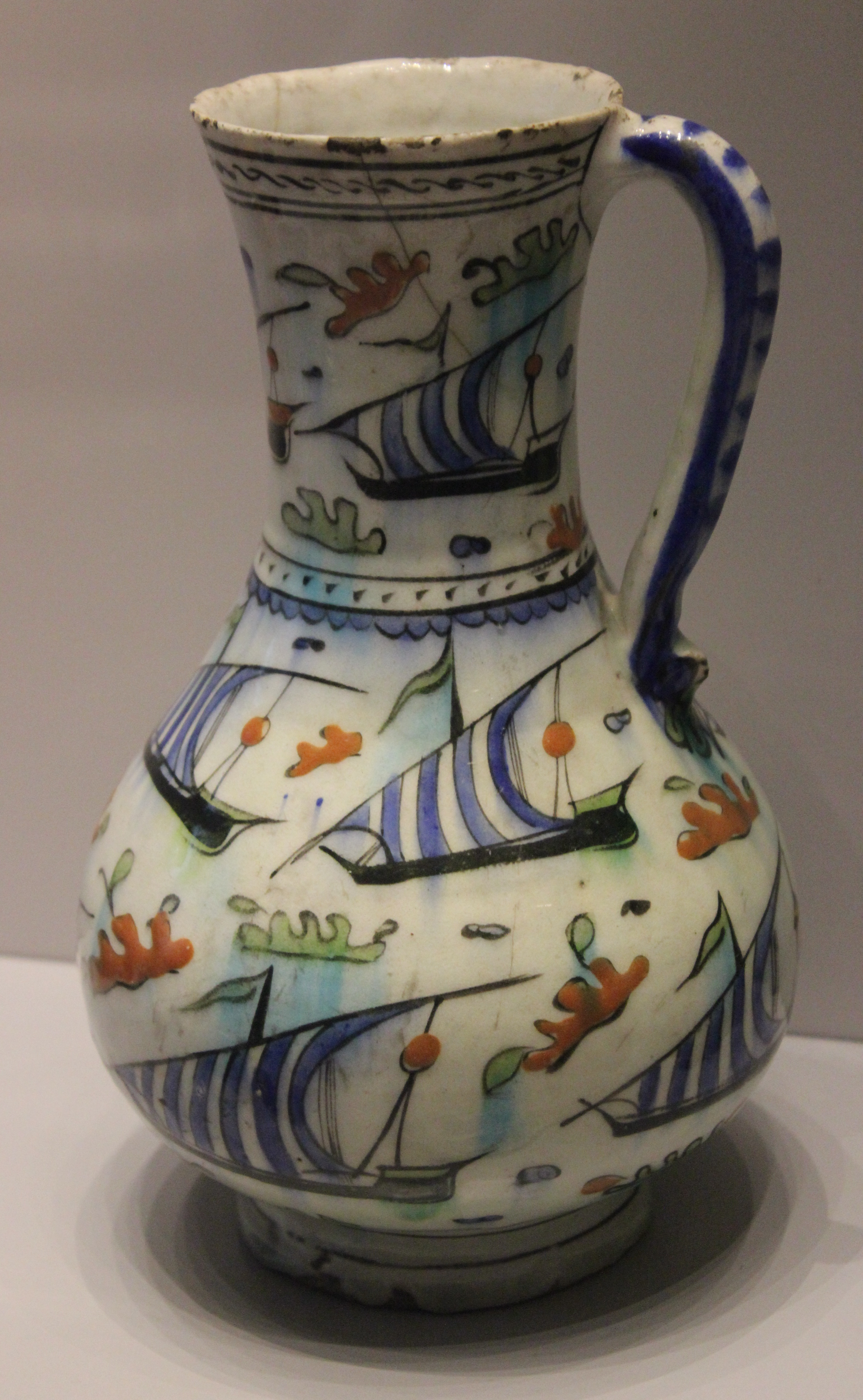 Berlín, Museo de arte islámico, cerámica otomana.